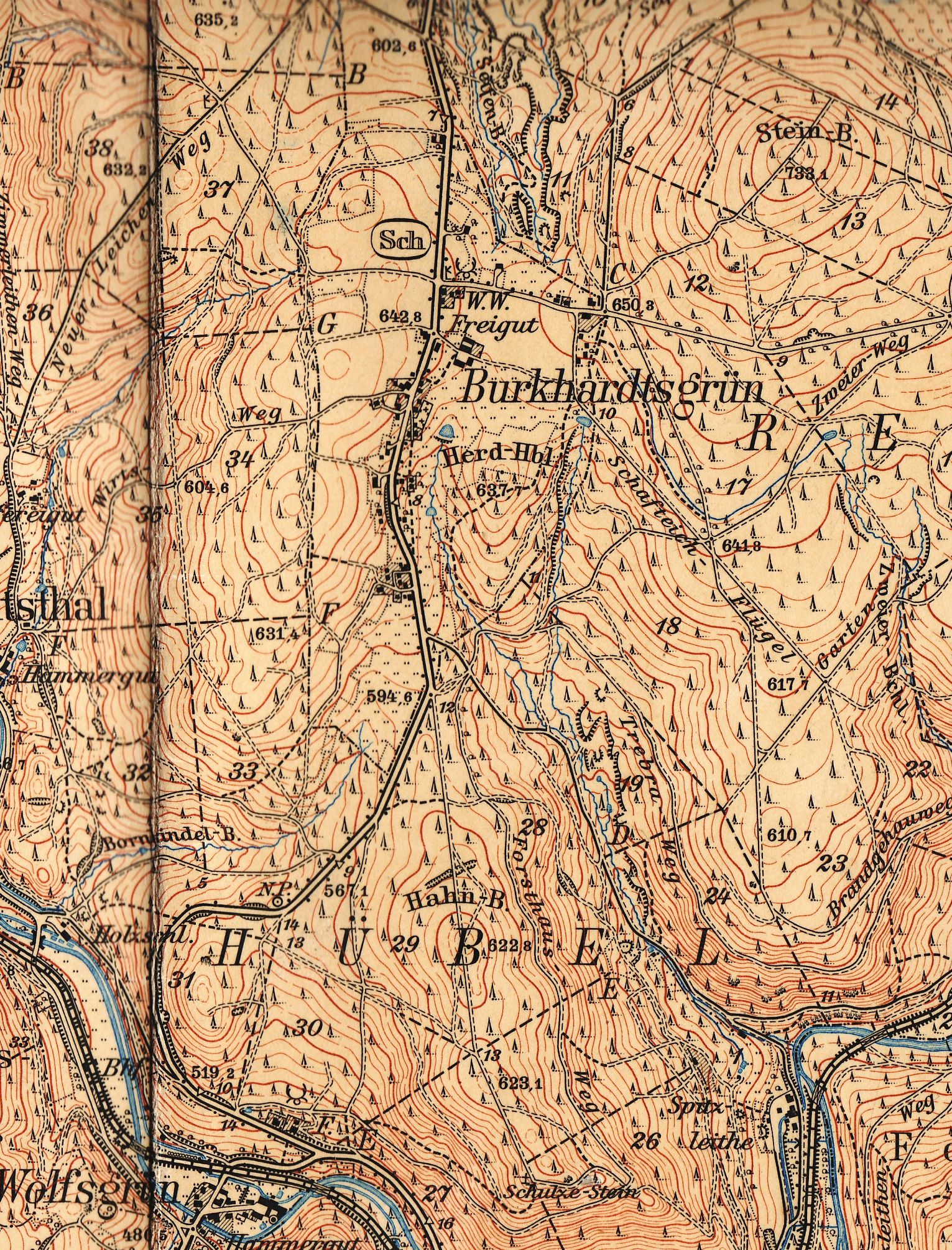 Burkhardtsgrün oberhalb des Tals der Zwickauer Mulde: Von einer Höhe von etwa 480 Meter am Bahnhof Wolfsgrün steigt die Straße nach Burkhardtsgrün auf fast 643 Meter. Die aus der Zeit um 1900 stammende Karte zeigt im Maßstab 1 : 25.000 zahlreiche Details.